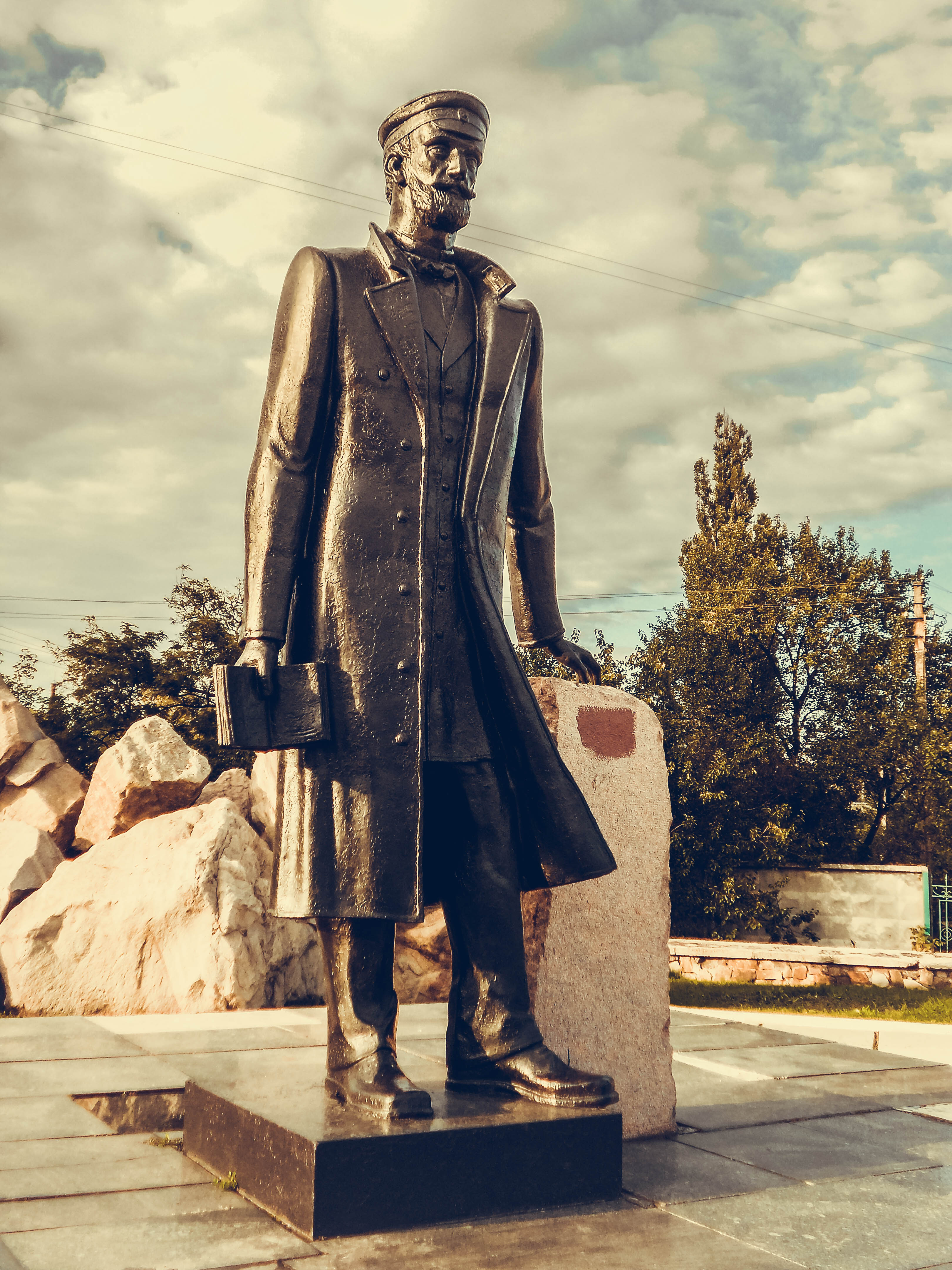 Пам'ятник Горлову П. М, засновнику м. Горлівка., Горлівка, Центрально-Міський р-н, перехрестя вул. Перемоги і вул. Першотравневої.